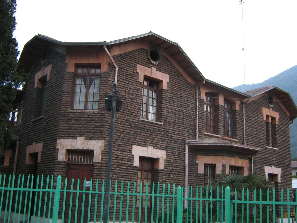 Ilustre Municipalidad de San José de Maipo, Cordillera, Chile